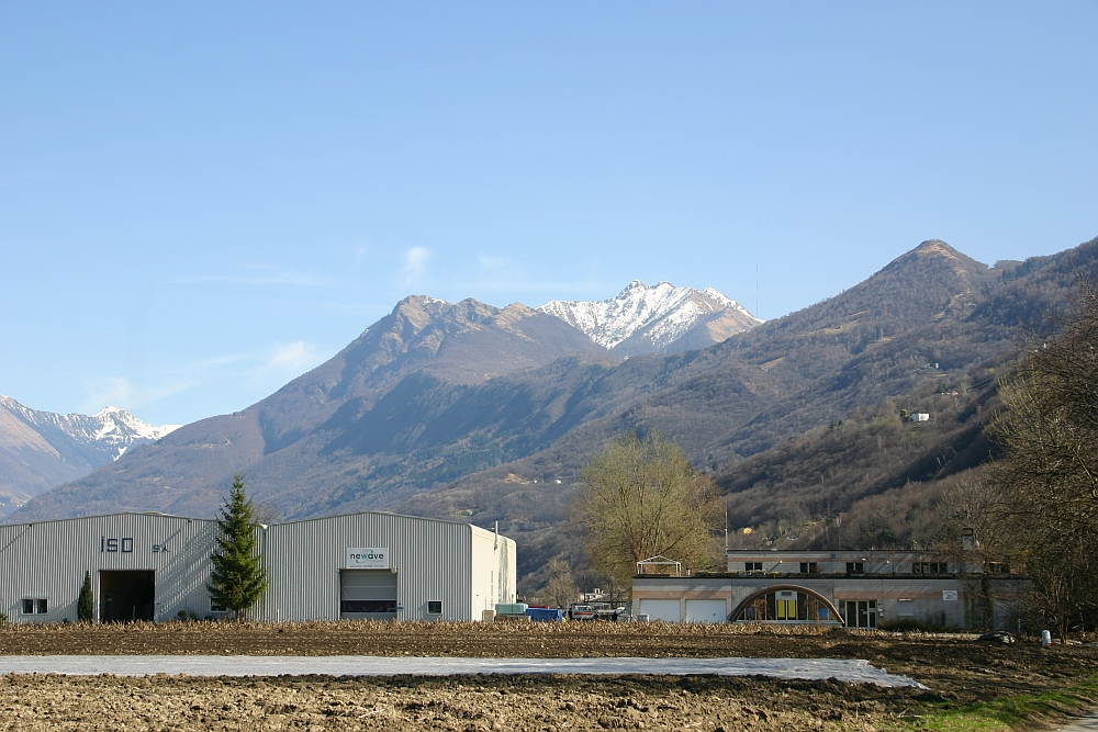 Luserte, ein wirtschaftlich aufstrebendes Gebiet am Rande von Magadino an der Grenze zu Contone im Tessin in der Schweiz